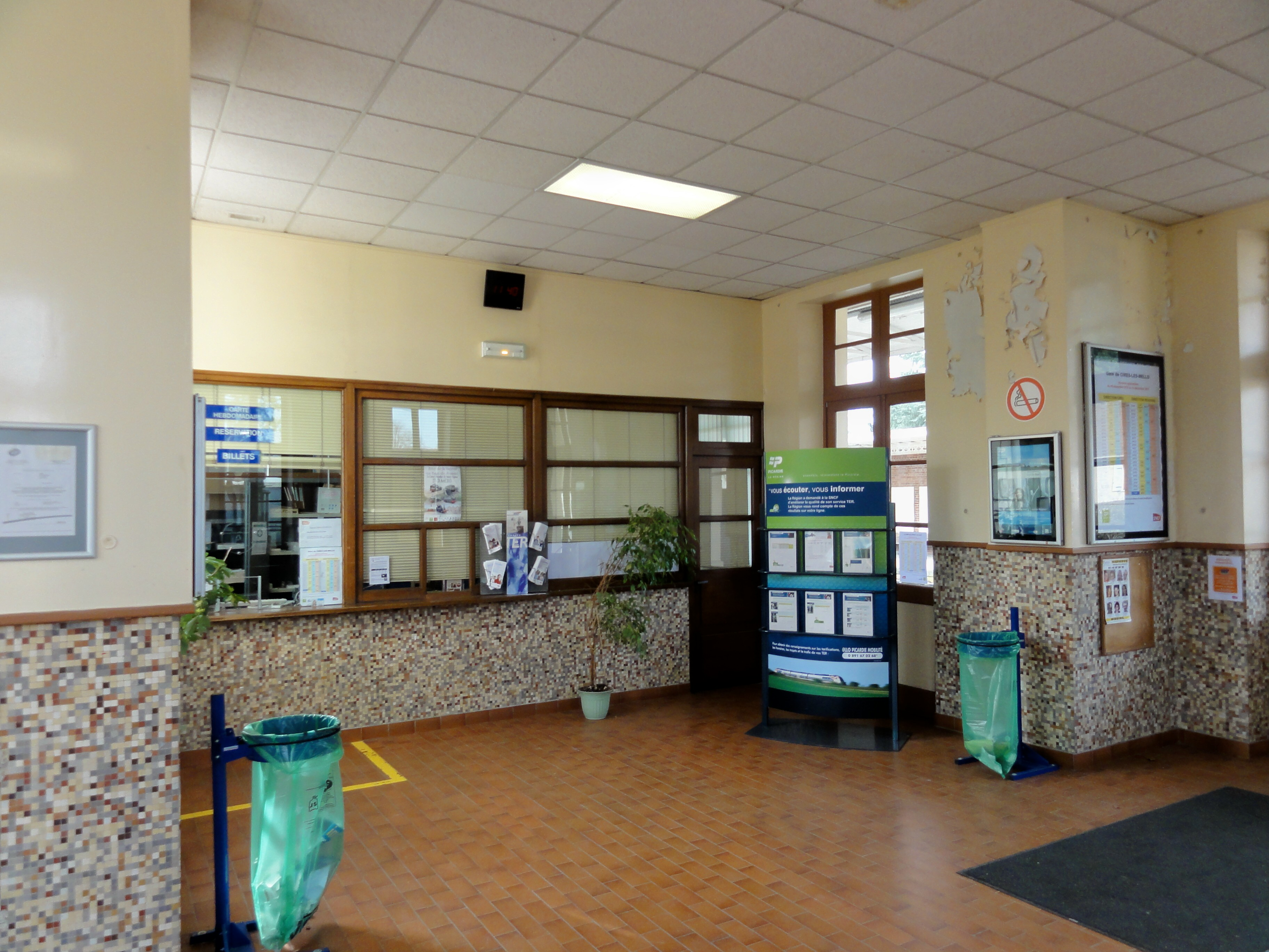 Salle d'attente - espace vente.